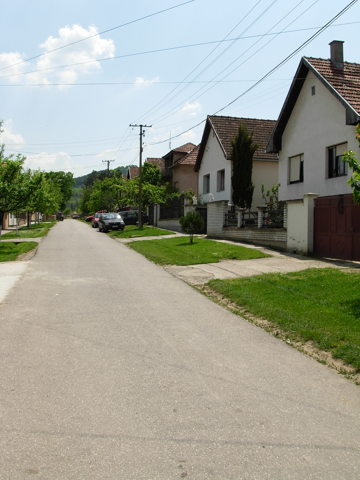 Soomaaliga: Partizanska ulica u Rakovcu.